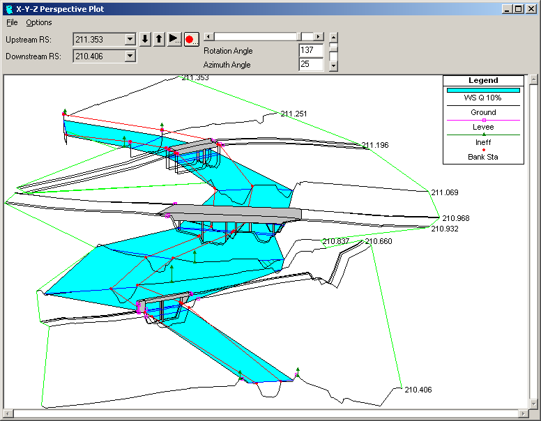 Prezentacja wyników obliczeń w HEC-RAS